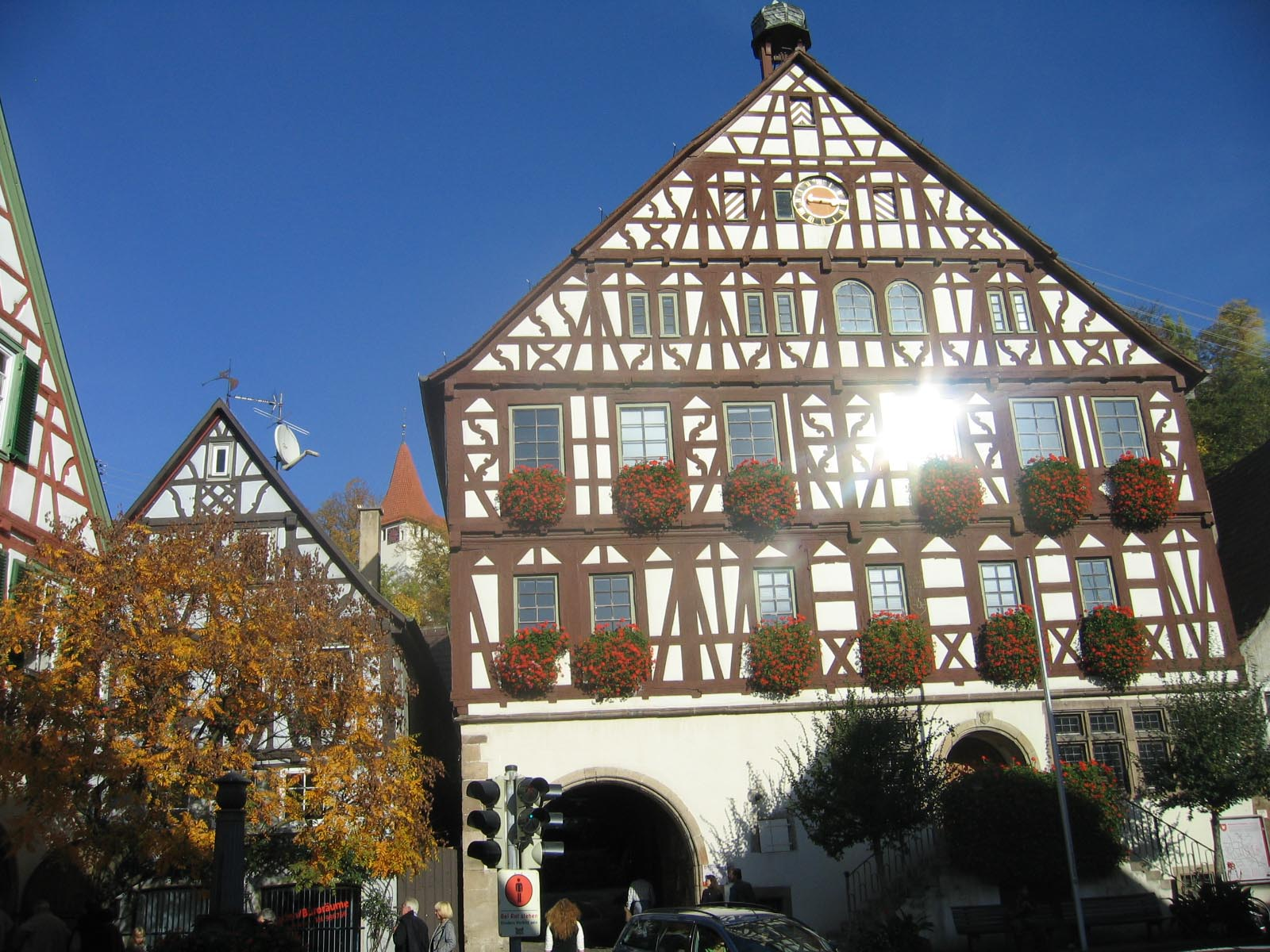 Townhall of Beilstein